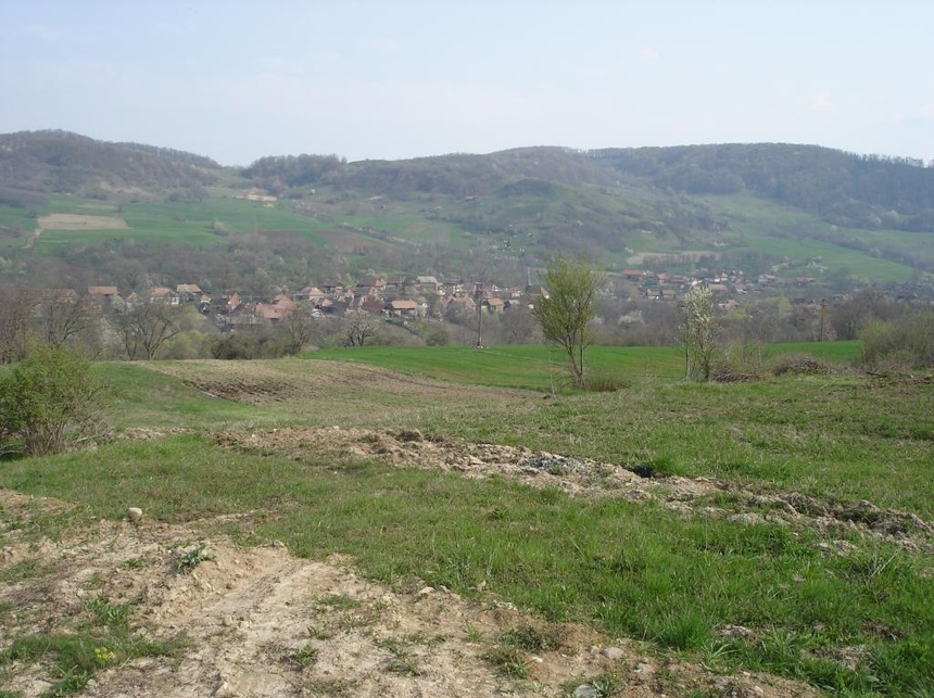 Kendő (Maros megye, Románia)